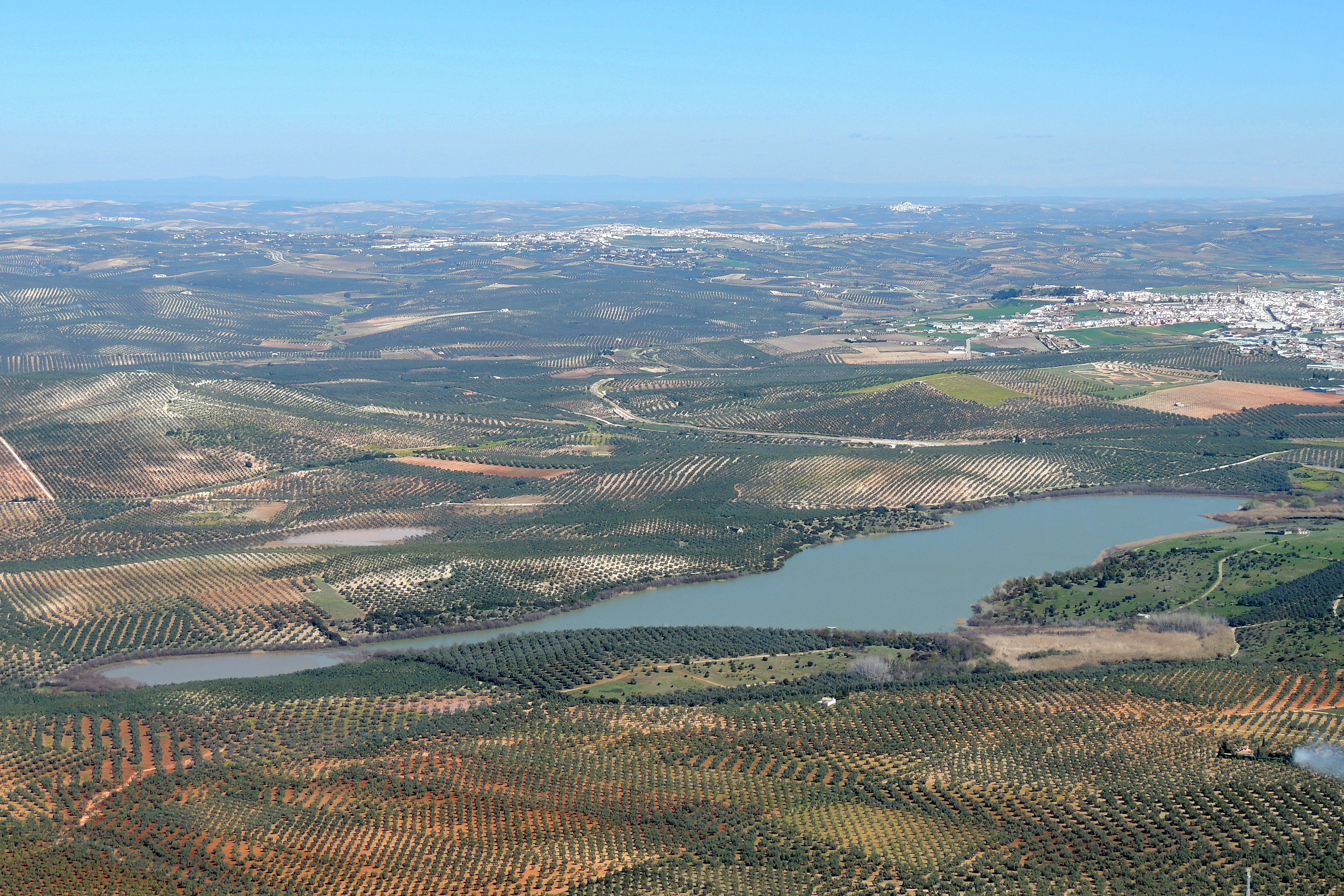 Fotografía aérea del complejo lagunar Zóñar - General - Jarambel - Lagunillas de Zurera - Huerta la Perrita (Aguilar de la Frontera).